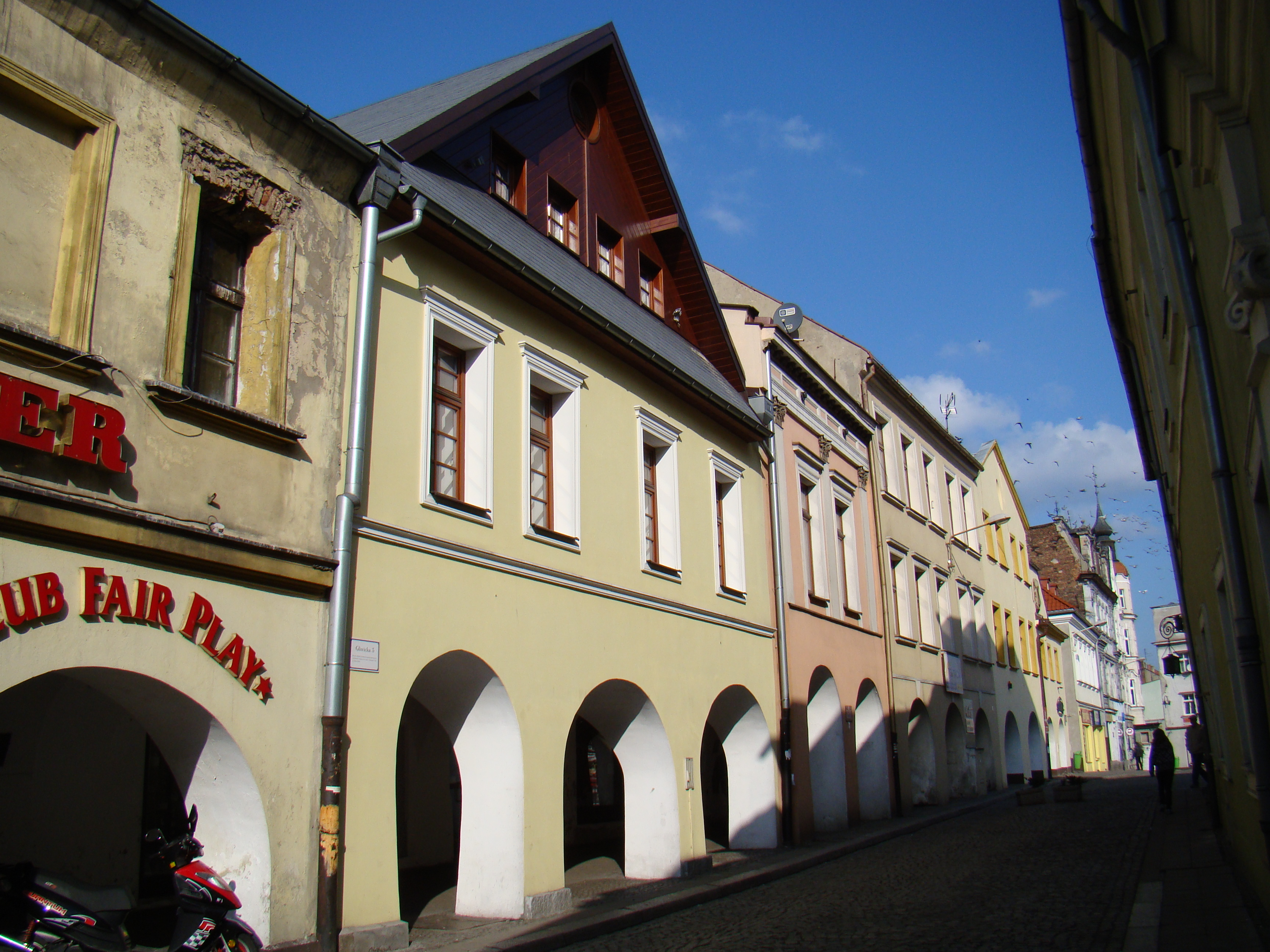 Tarnowskie Góry, dom, 1630, 1895